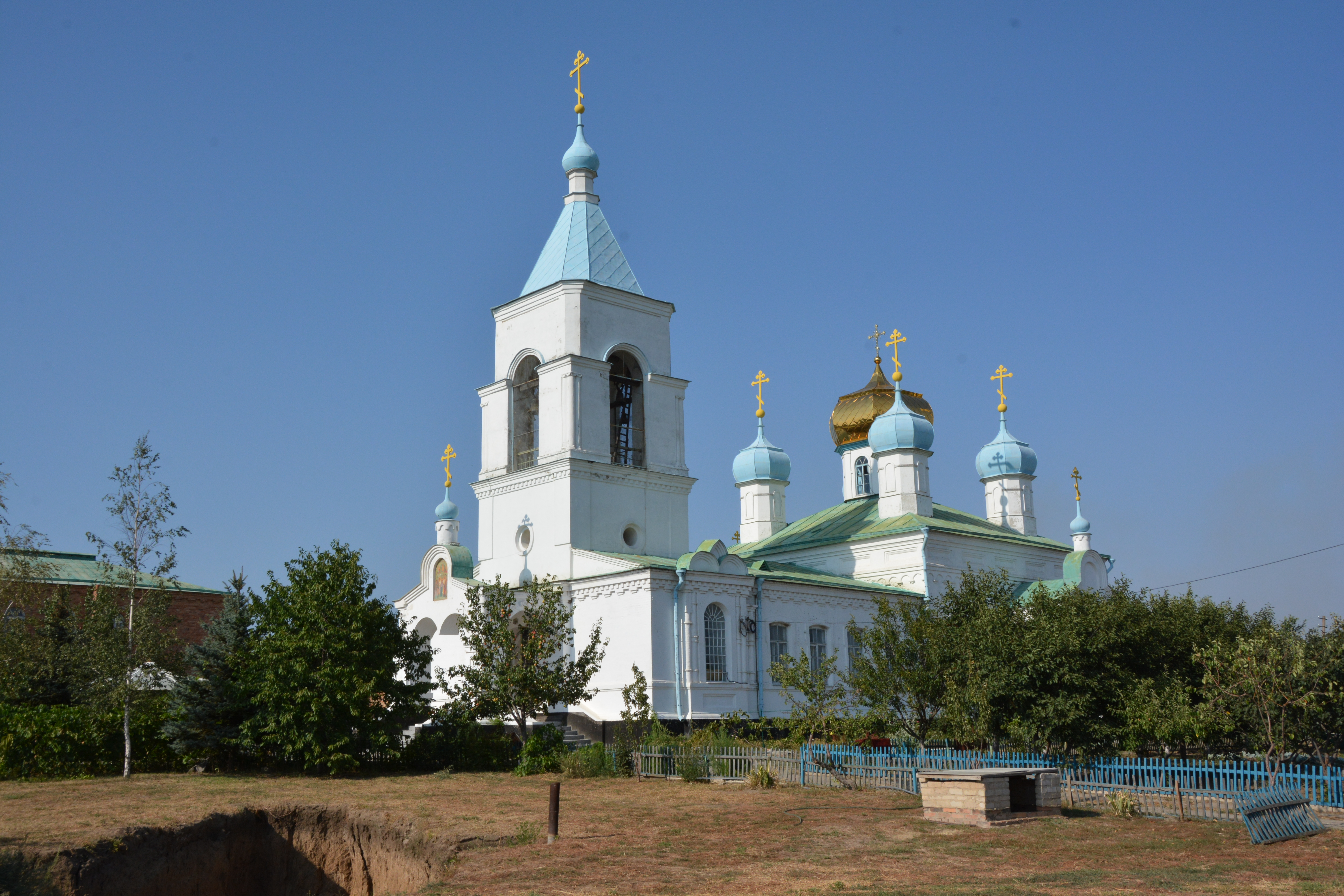 Вознесенська церква, Токмак, вул. Володарського, 68